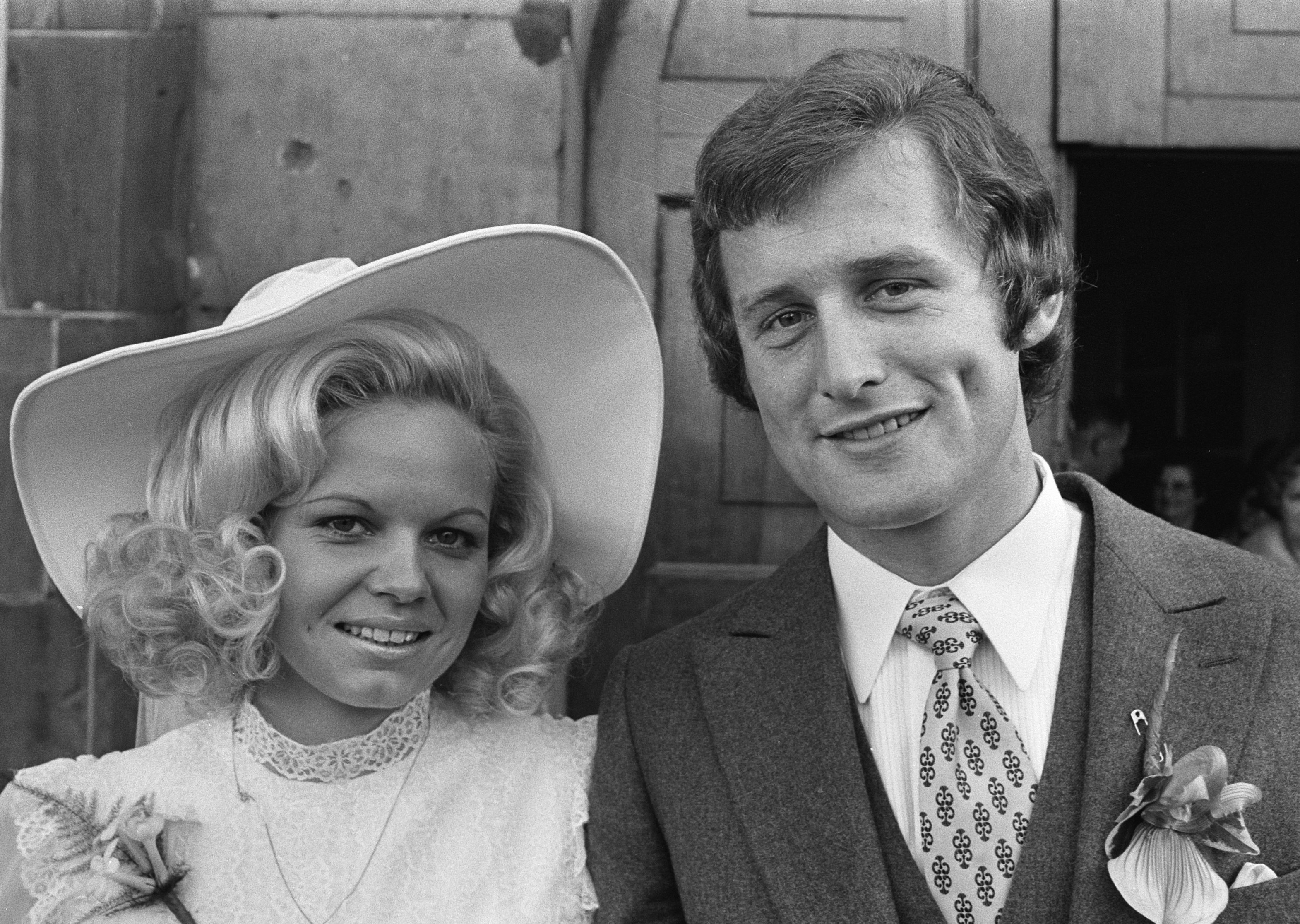 Voetballer Hans van de Pluym van FC Den Bosch trouwt met Ans Galiart op stadhuis Den Bosch , Van de Pluym en echtgenote kop